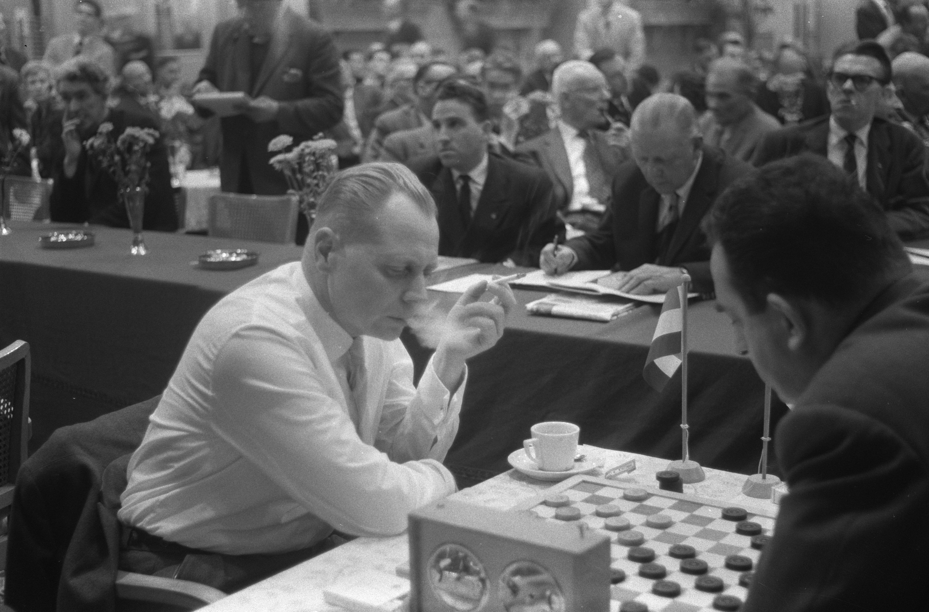 Wereldkampioenschap dammen te Amsterdam, Bom